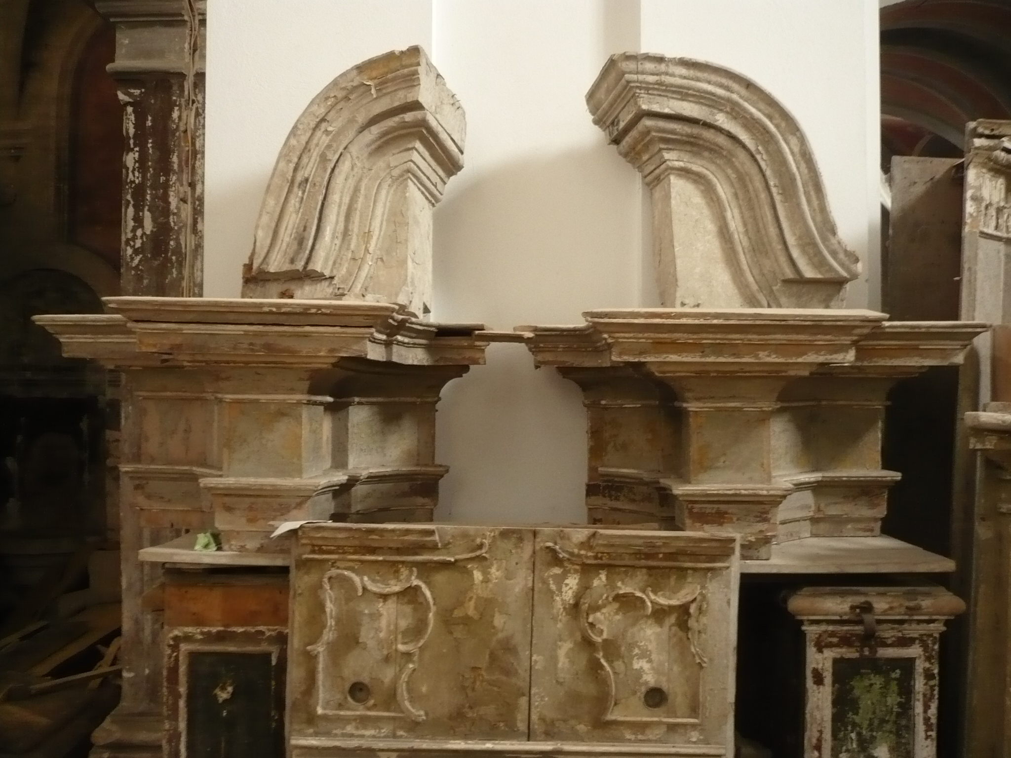 Zbaraż, kościół oo. bernardynów